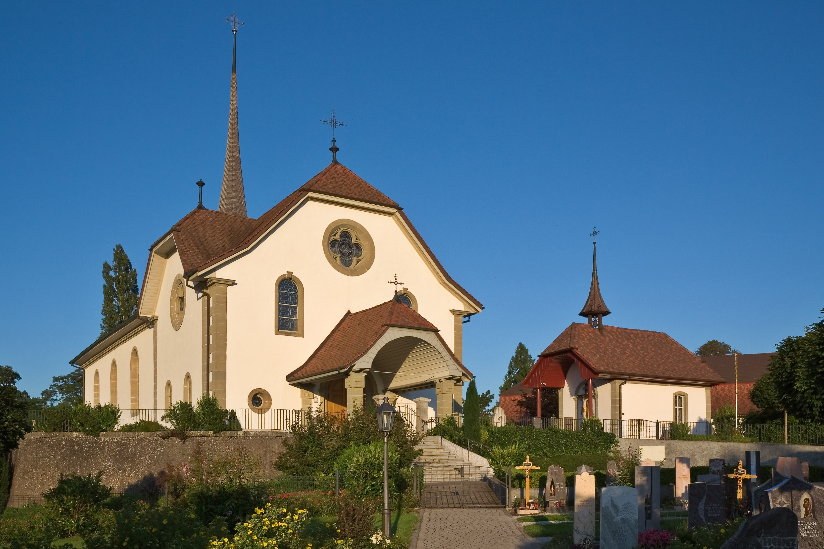 Die Pfarreikirche Sankt Jakob